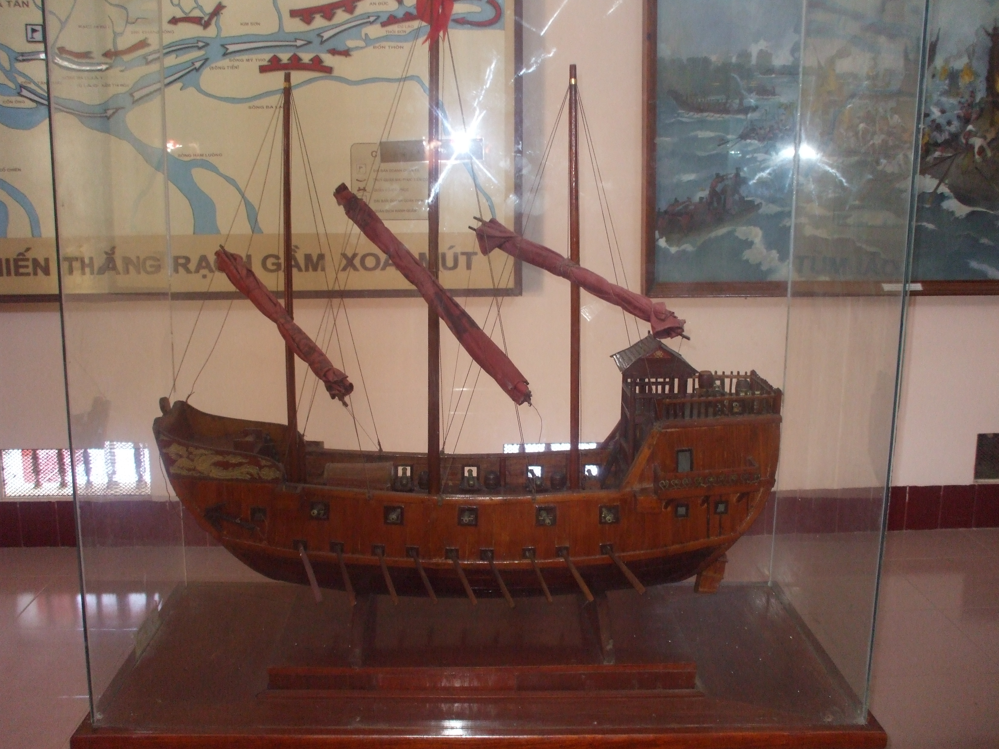 Mô hình tàu Đại hiệu của thủy quân Tây Sơn, hiện đang trưng bày tại Bảo tàng Tây Sơn (Bình Định, Việt Nam). Đây là loại tàu lớn có trang bị hỏa lực mạnh lúc bấy giờ .